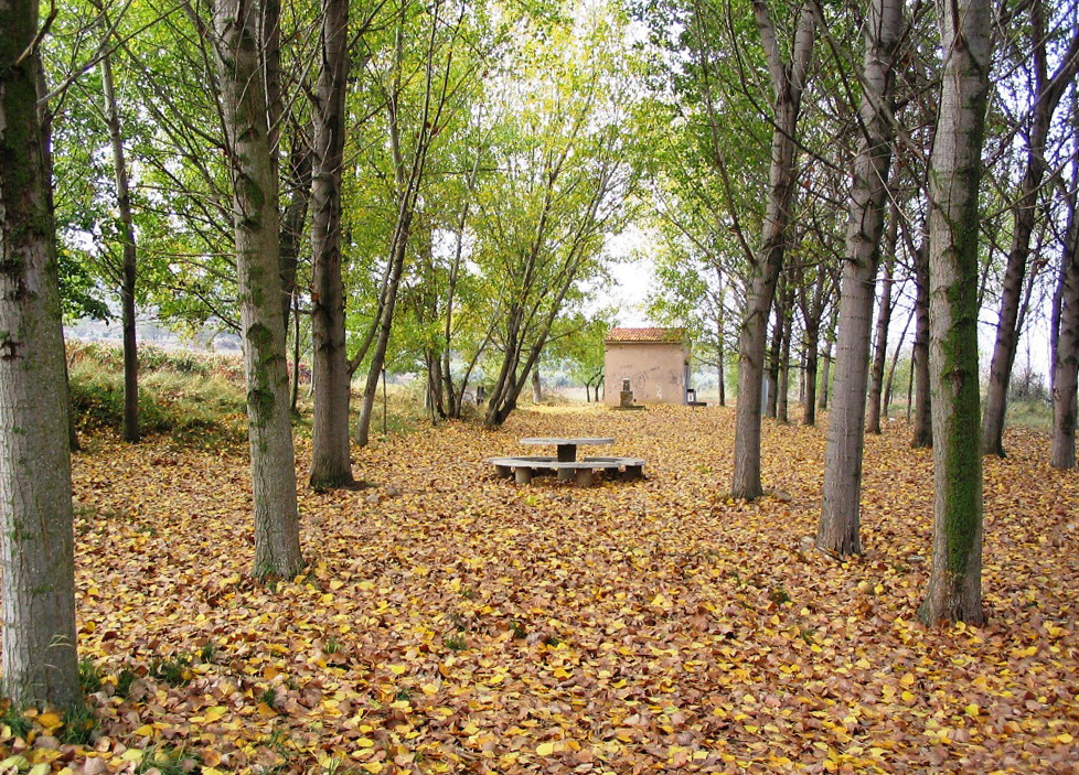 Galilea (La Rioja).- Chopera municipal